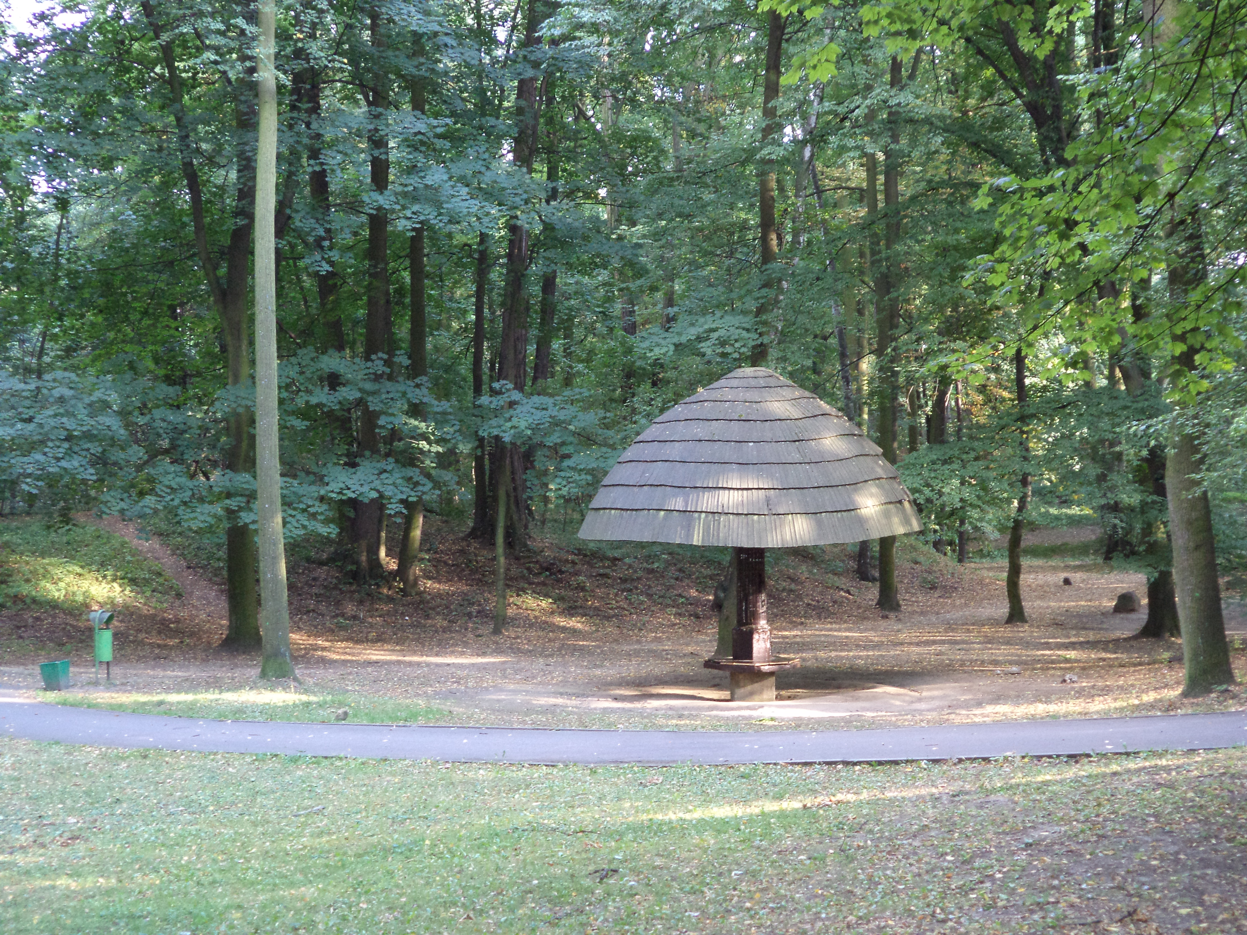 "Grzybek" w parku miejskim w Tarnowskich Górach